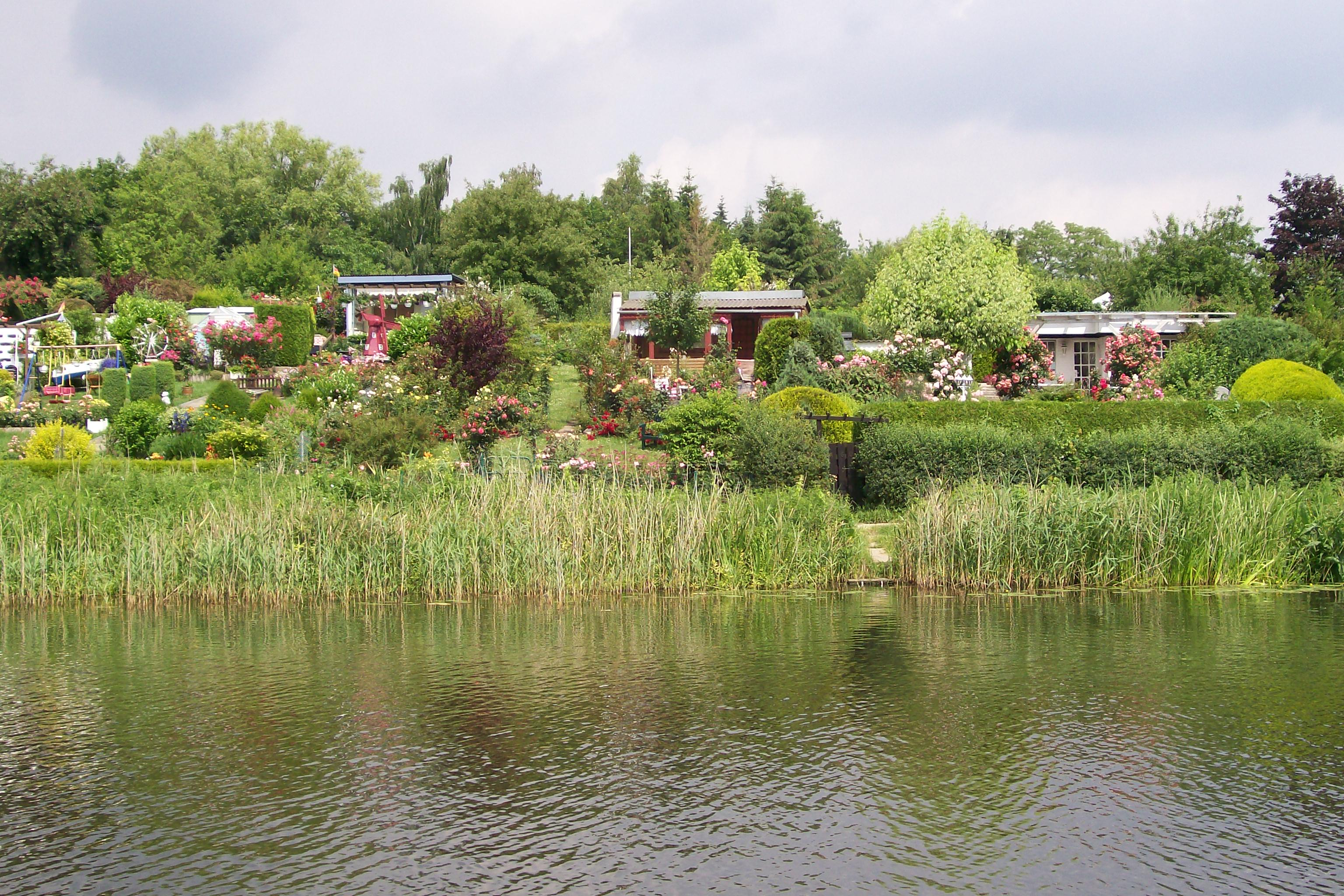 River Wakenitz in Lübeck, Schleswig-Holstein, Germany, view from boat to gardens in Lübeck, eastern bank